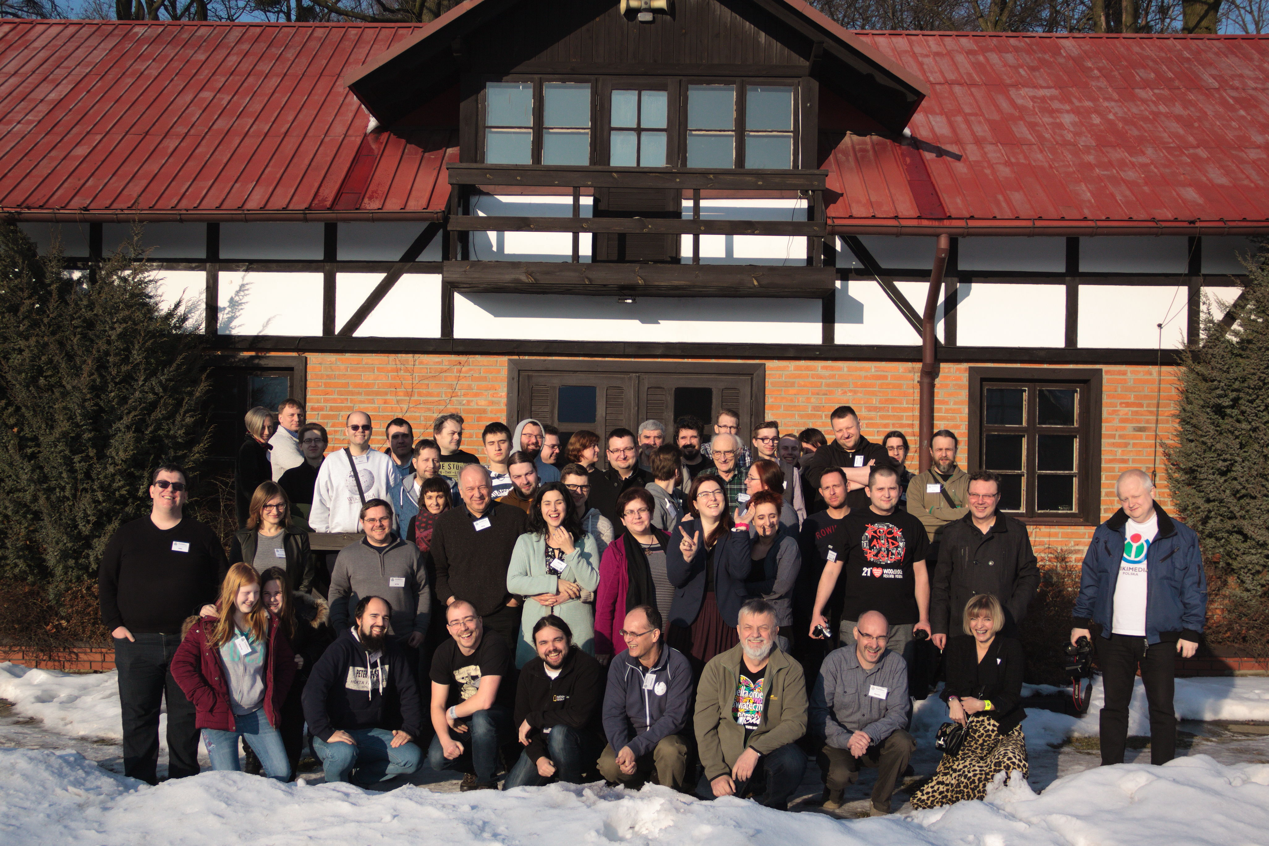 Grupowe zdjęcie wikimedian - Zlot Zimowy 2017, Tworzyjanki.